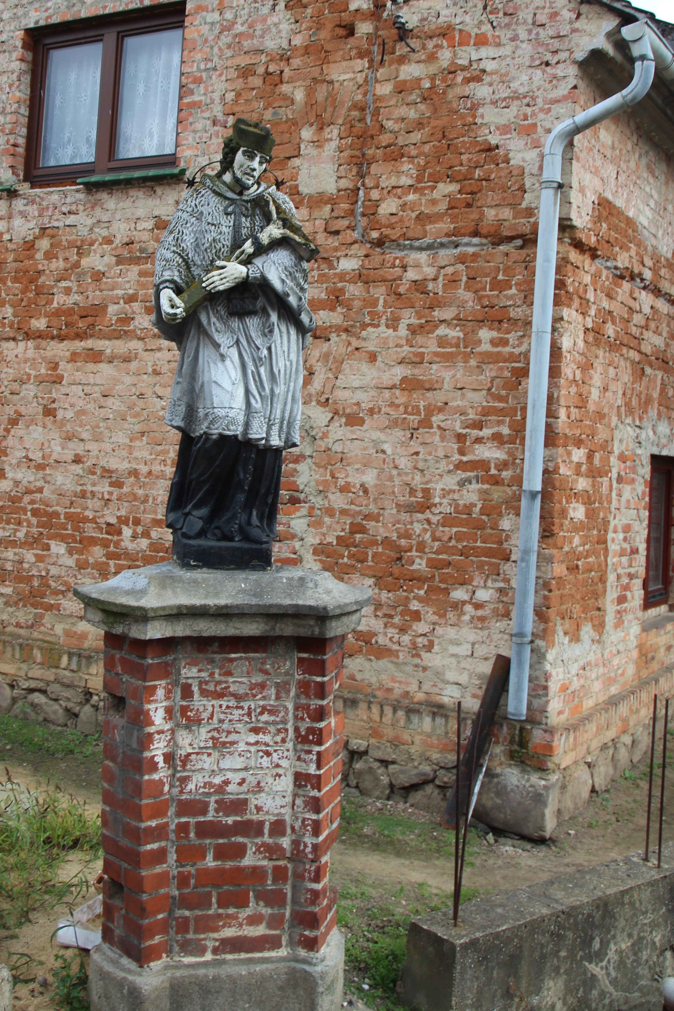 Cieszanowice – wieś w Polsce położona w województwie opolskim, w powiecie nyskim, w gminie Kamiennik.